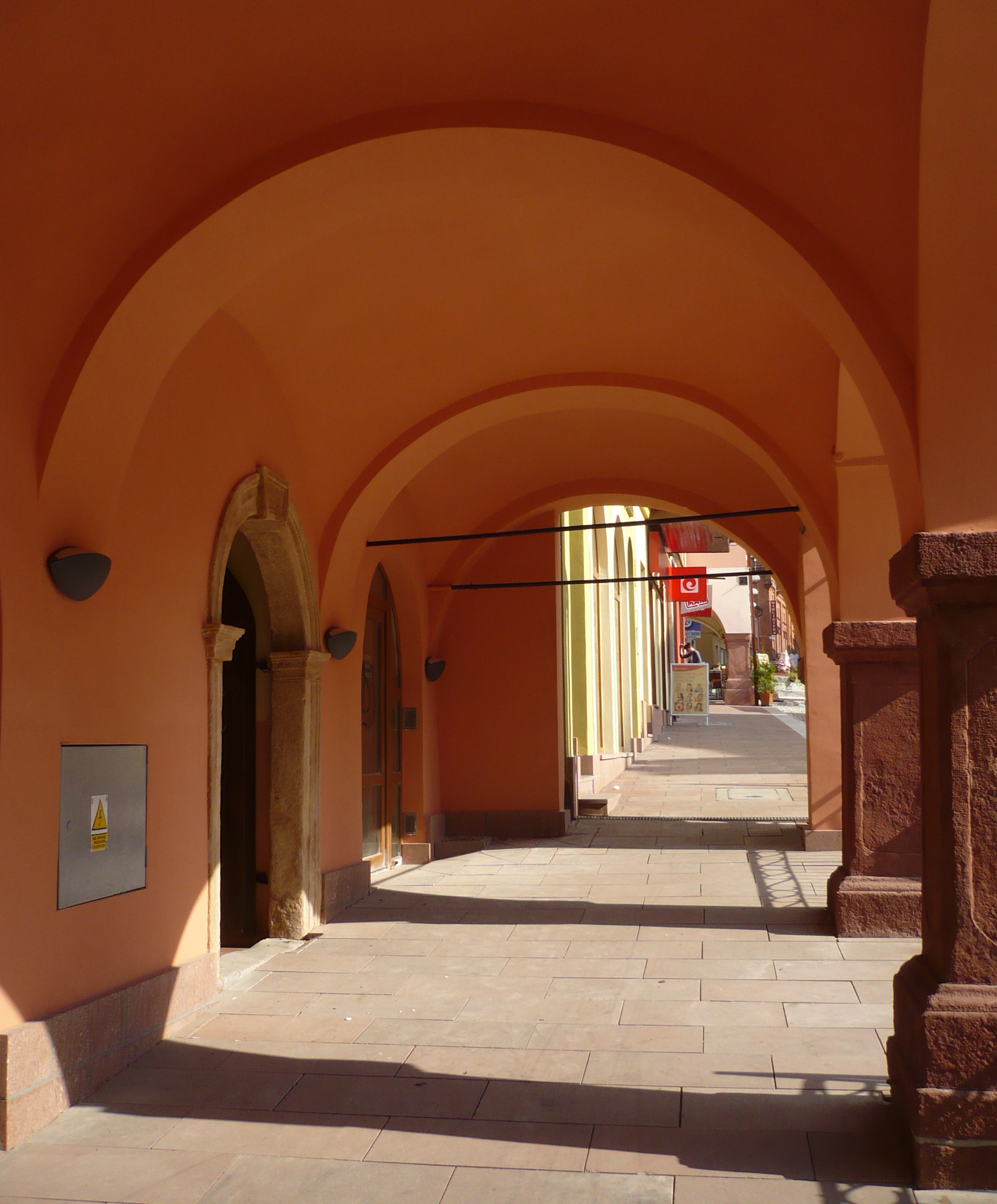 Nowa Ruda. Rynek 3